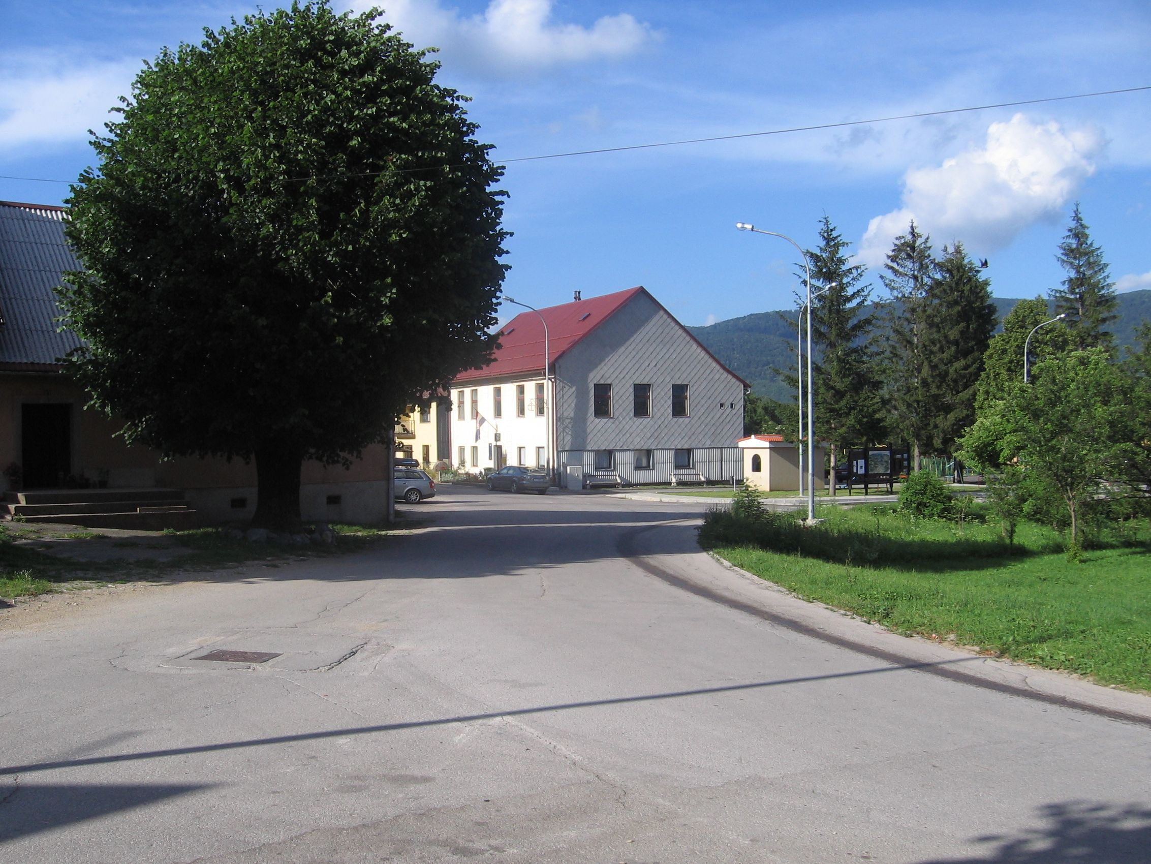 selo Lič, privatno vlasništvo suradnika Zeljko